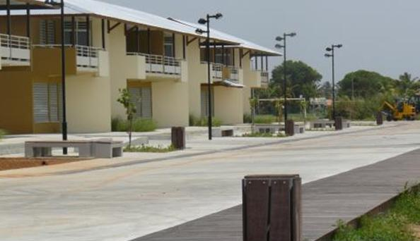 rénovation du quartier 205